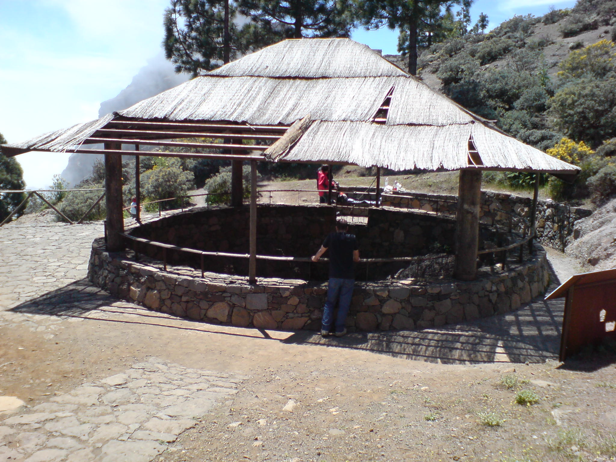 Pozo de nieve Los Canónigos. Data del año 1669. Restaurado en 1998. Junto al Pico de las Nieves, Gran Canaria. Nevero artificial.